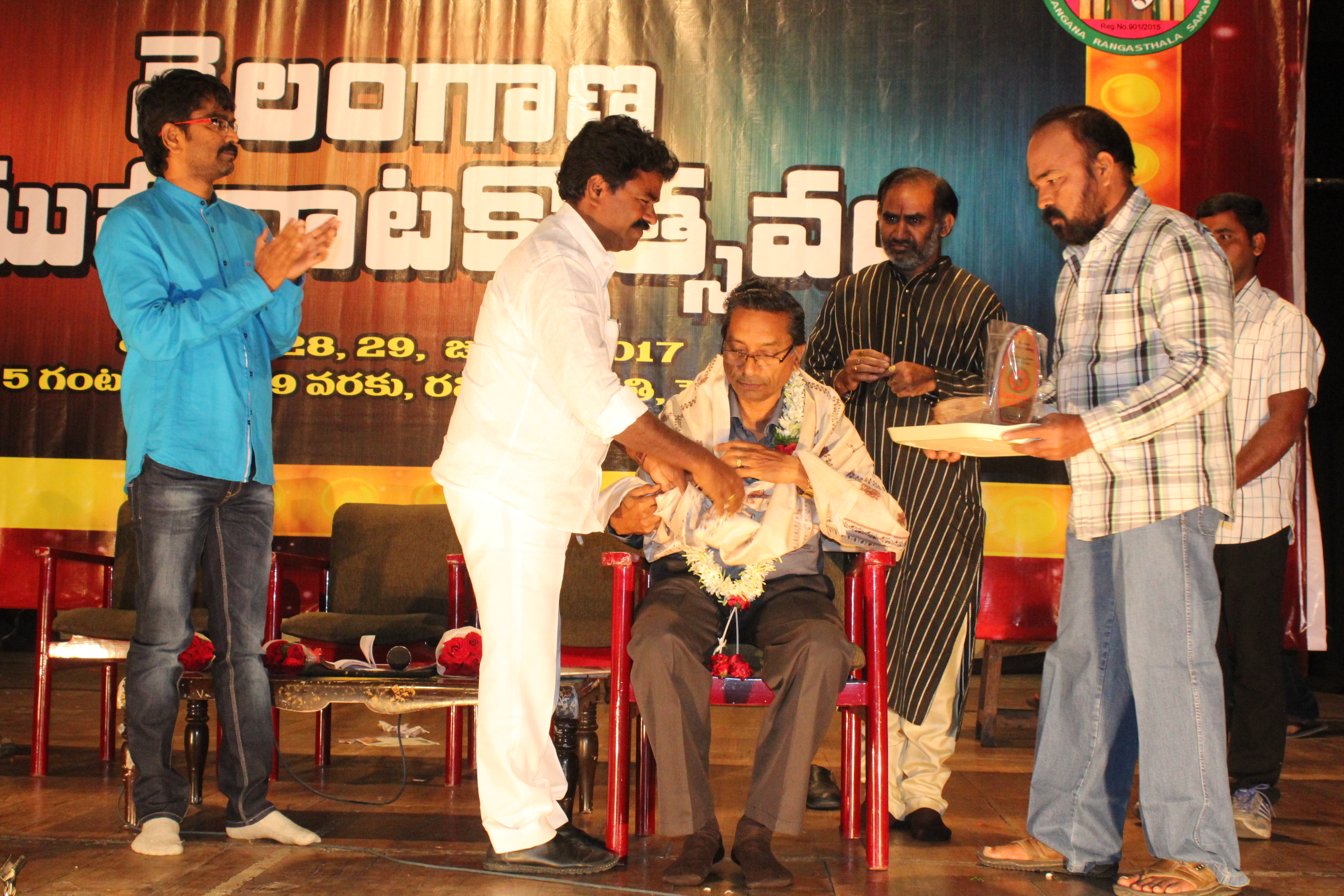 తెలంగాణ రంగస్థల సమాఖ్య ఆధ్వర్యంలో సంగనభట్ల నర్సయ్యకు సత్కారం